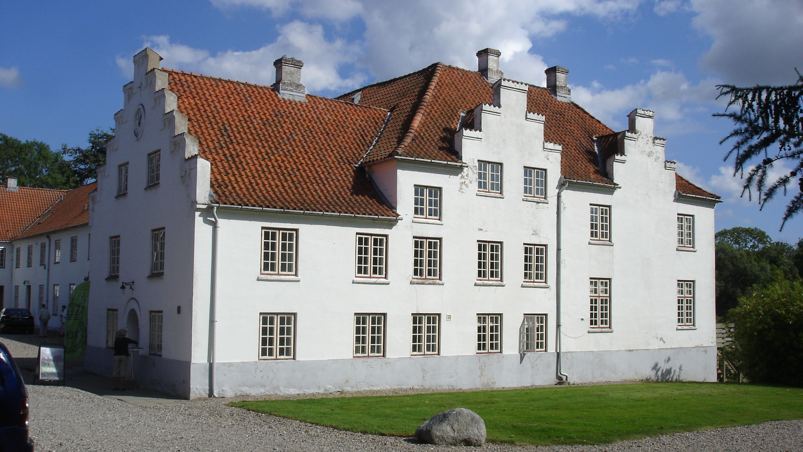 Uddannelsescenter Søgårdlejren, vestfløjen fra 1858-60